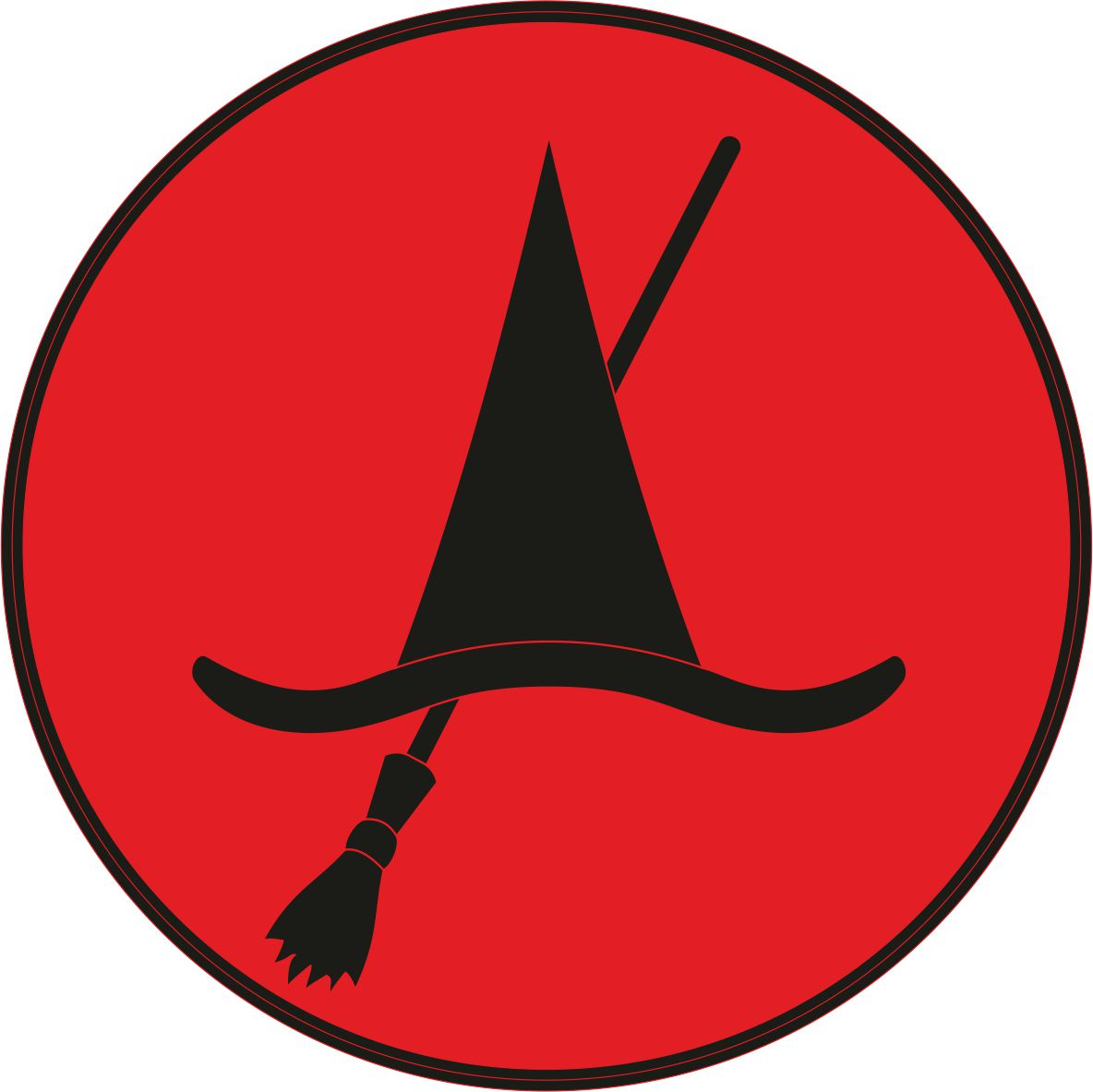 Відзнака Куреня Степові Відьми